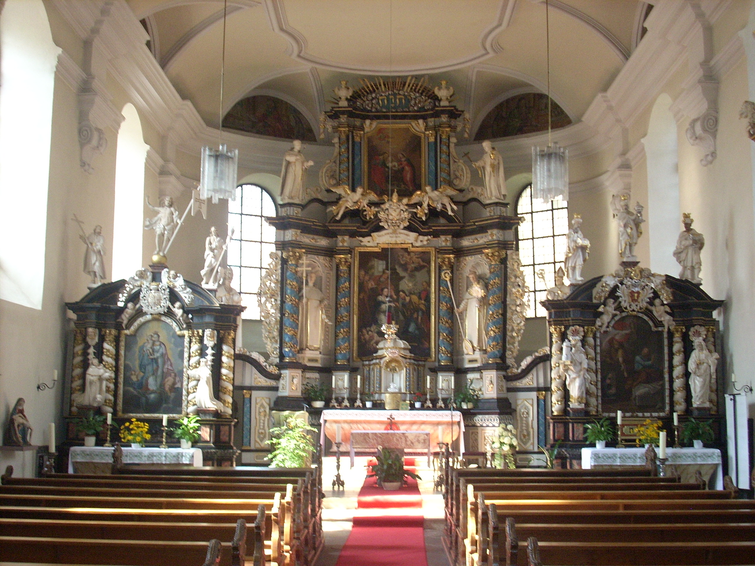 Gronau (Leine), kath. Kirche St. Joseph, Inneres